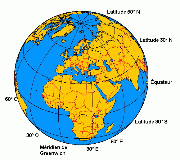 On constate sur ce schéma que la ville du Caire se trouve sensiblement à la latitude de 30° Nord et à la longitude de 30° Est. Dessin réalisé grâce au site Légendé par mes soins.